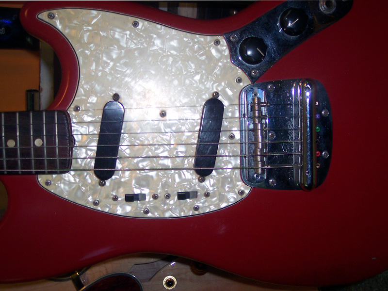 My 1973 Fender Mustang